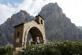 La chiesetta accanto al rif: Brentei, nello sfondo il Crozzon di Brenta